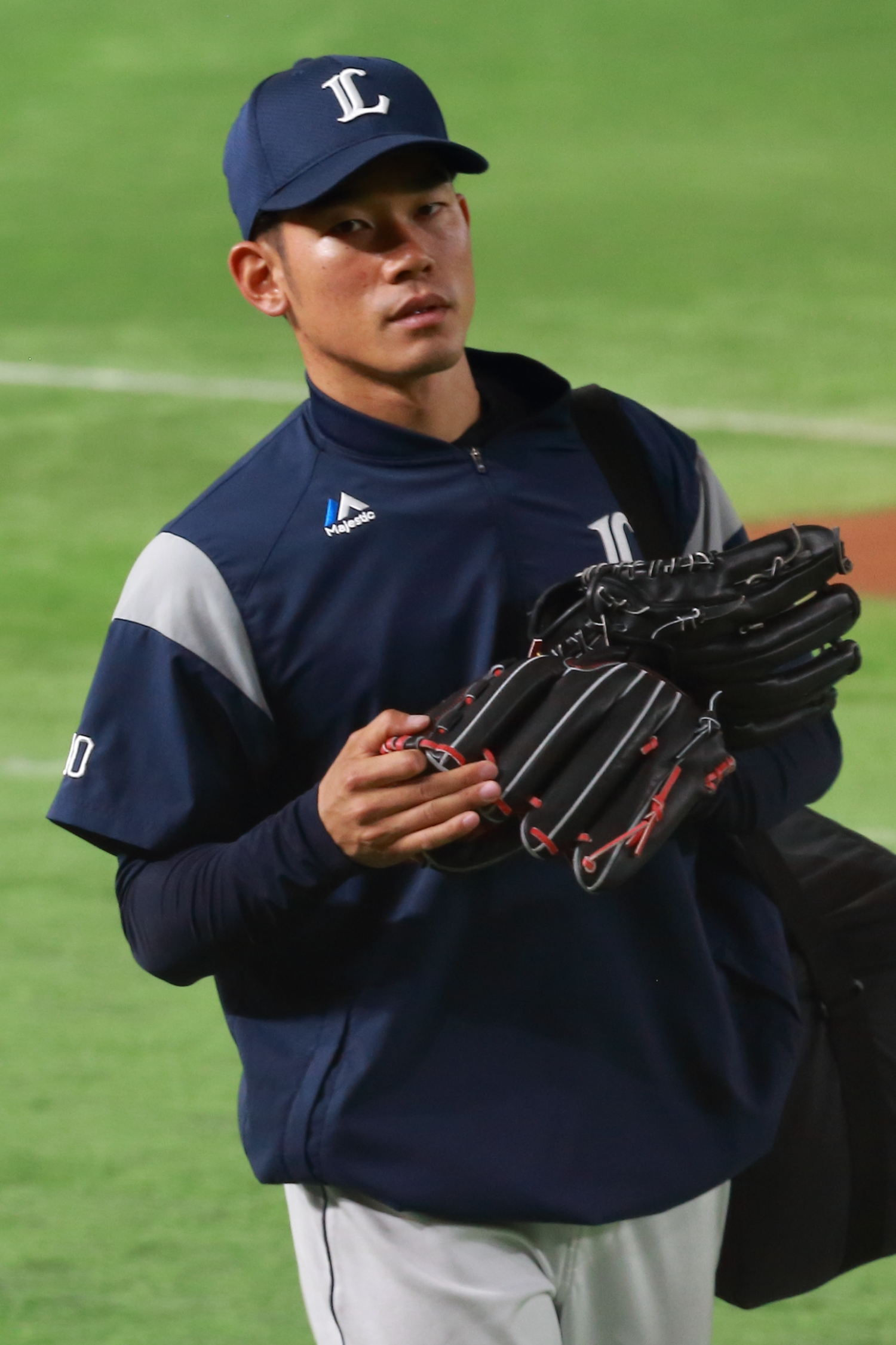 埼玉西武ライオンズの田村伊知郎選手。2018年6月9日、東京ドームで撮影。